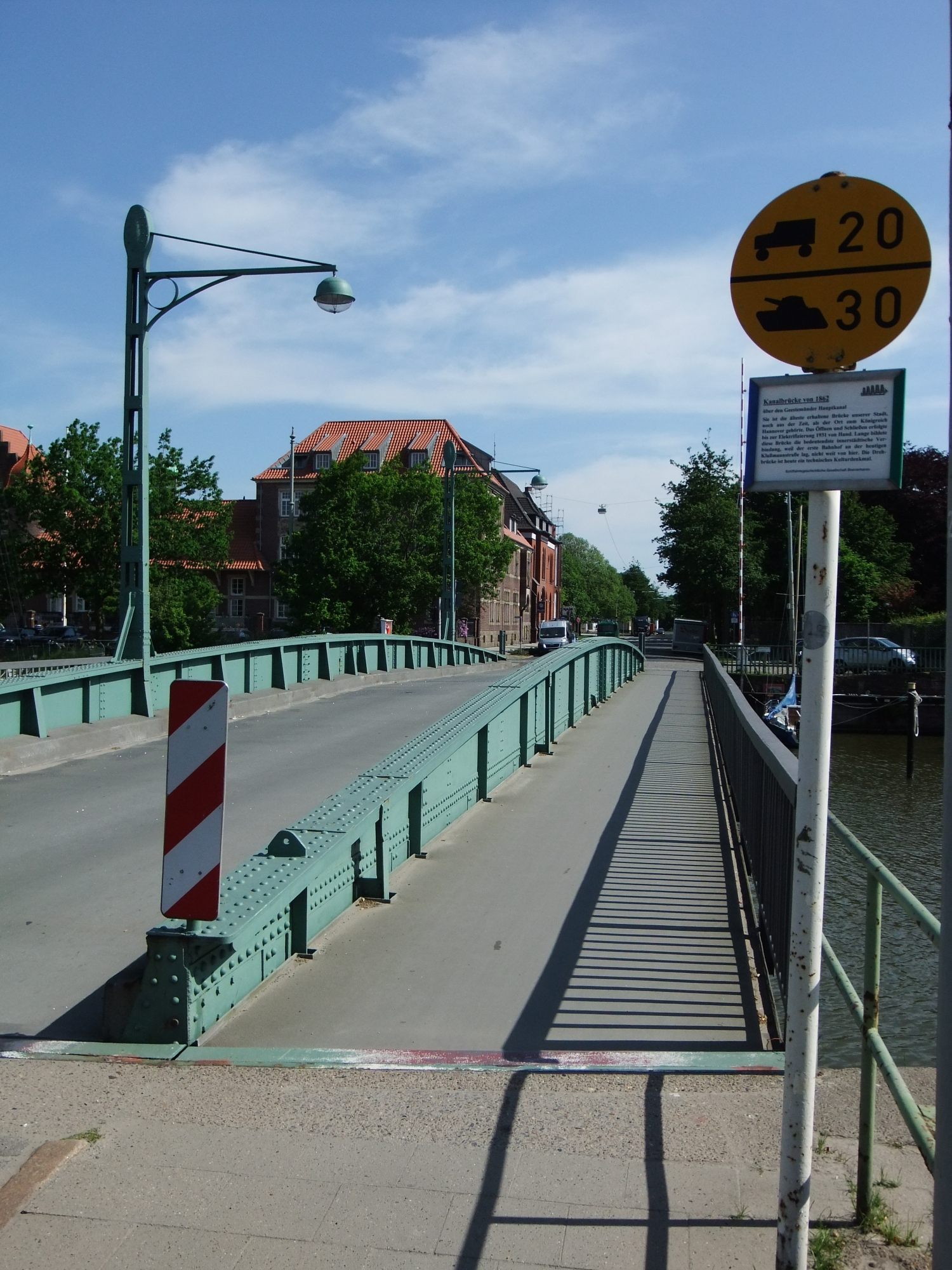 Brücke in Bremerhaven, Klußmannstraße. Das abgebildete Objekt ist ein geschütztes Kulturdenkmal in der Freien Hansestadt Bremen, mit der Nr. 3120 beim Landesamt für Denkmalpflege registriert.